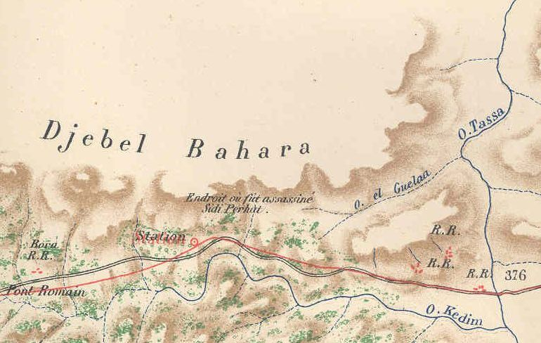 Extrait d'une carte d'état-major dressée en 1879 par le capitaine Derrien et montrant l'emplacement du meurtre de l'agha Farhat en 1864